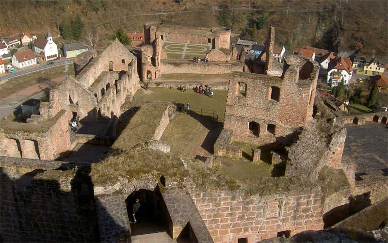 Bildbeschreibung: Die Hardenburg vom Hauptturm betrachtet Fotograf/Zeichner: McD Datum: 19.03.2006 Sonstiges